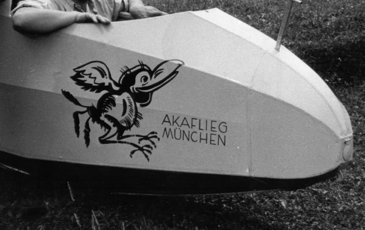 Das Logo der Akaflieg München Huckebein der Raabe am Rumpf der Akaflieg Mü 10